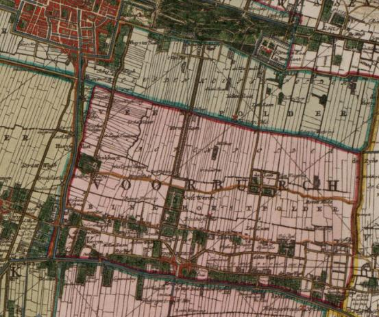 Binkhorstpolder.